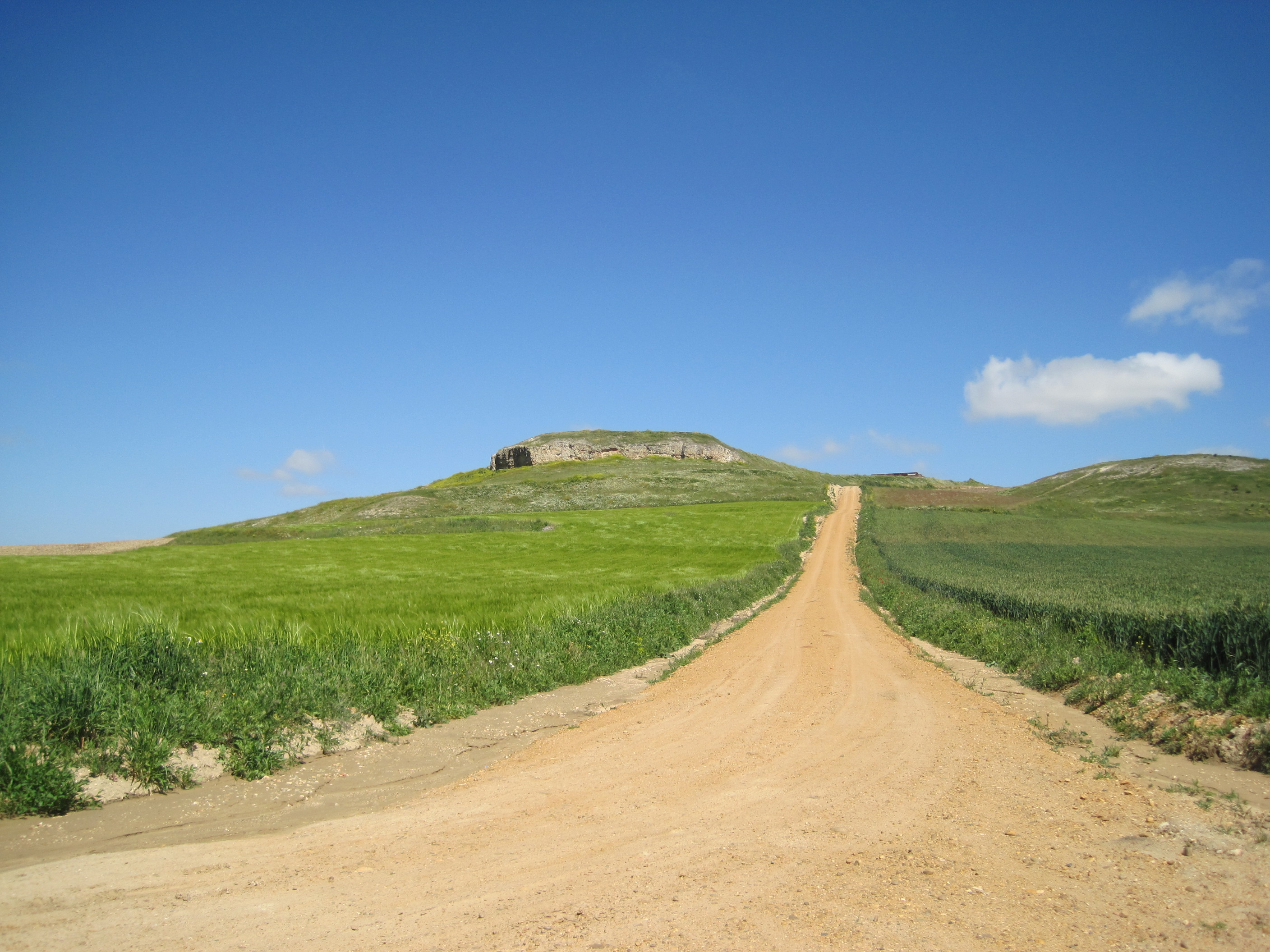 Vista del Teso de la Mora, en Molacillos (Zamora, España).